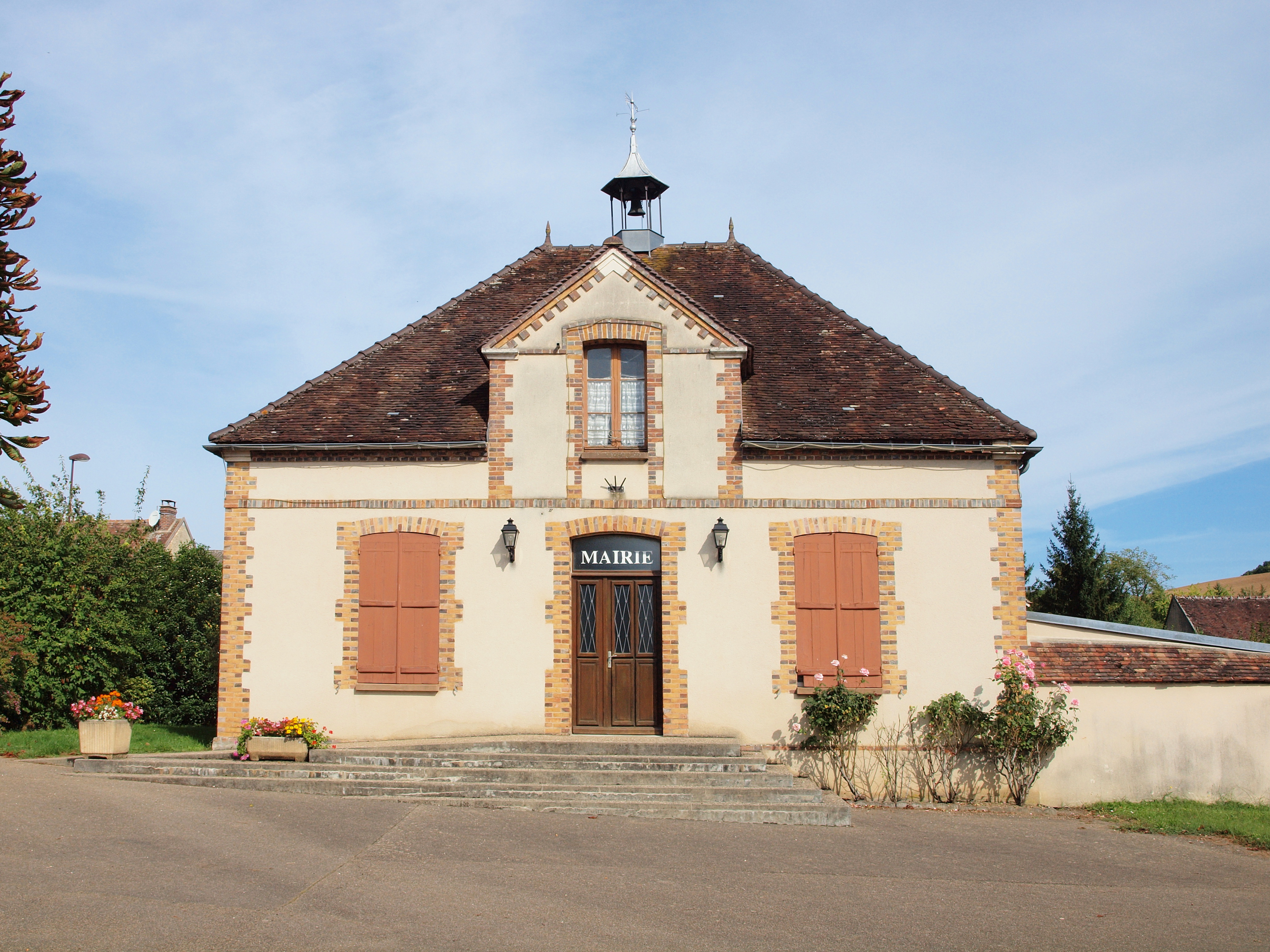 Villiers-Louis (Yonne, France)